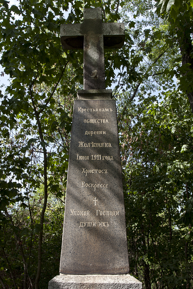 На одному зі старих цвинтарів у с. Залізня Житомирського району встановлений пам"ятний хрест, датований червнем 1911 року